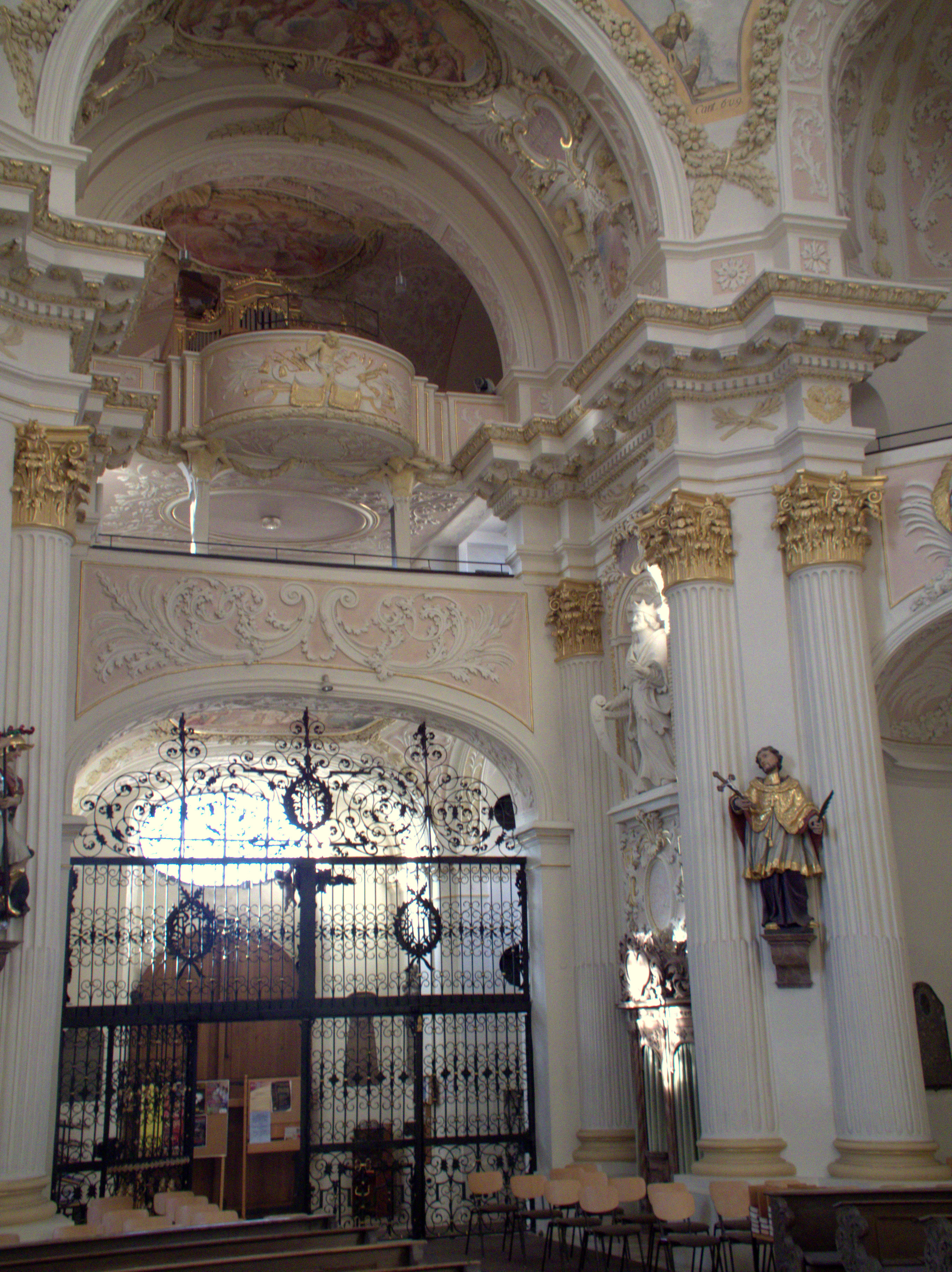 Die barocke Wallfahrtskirche Maria-Hilf im Oberpfälzischen Freystadt im Winter 2012